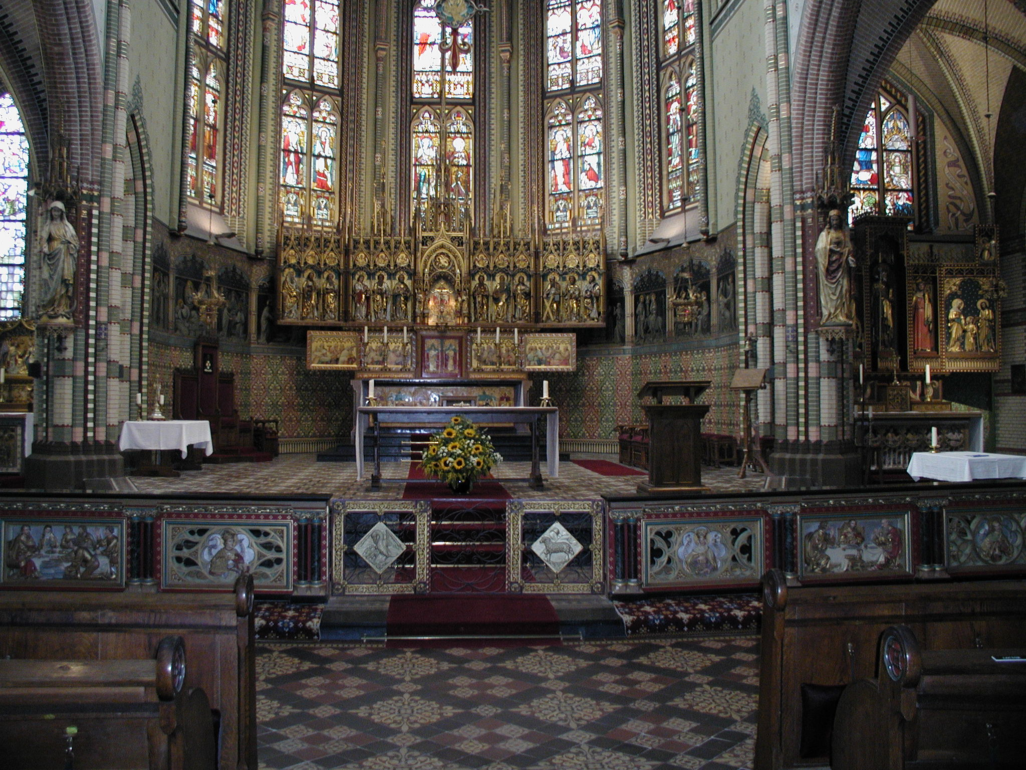 Interieur van de Sint-Jozefkathedraal aan de Radesingel te Groningen